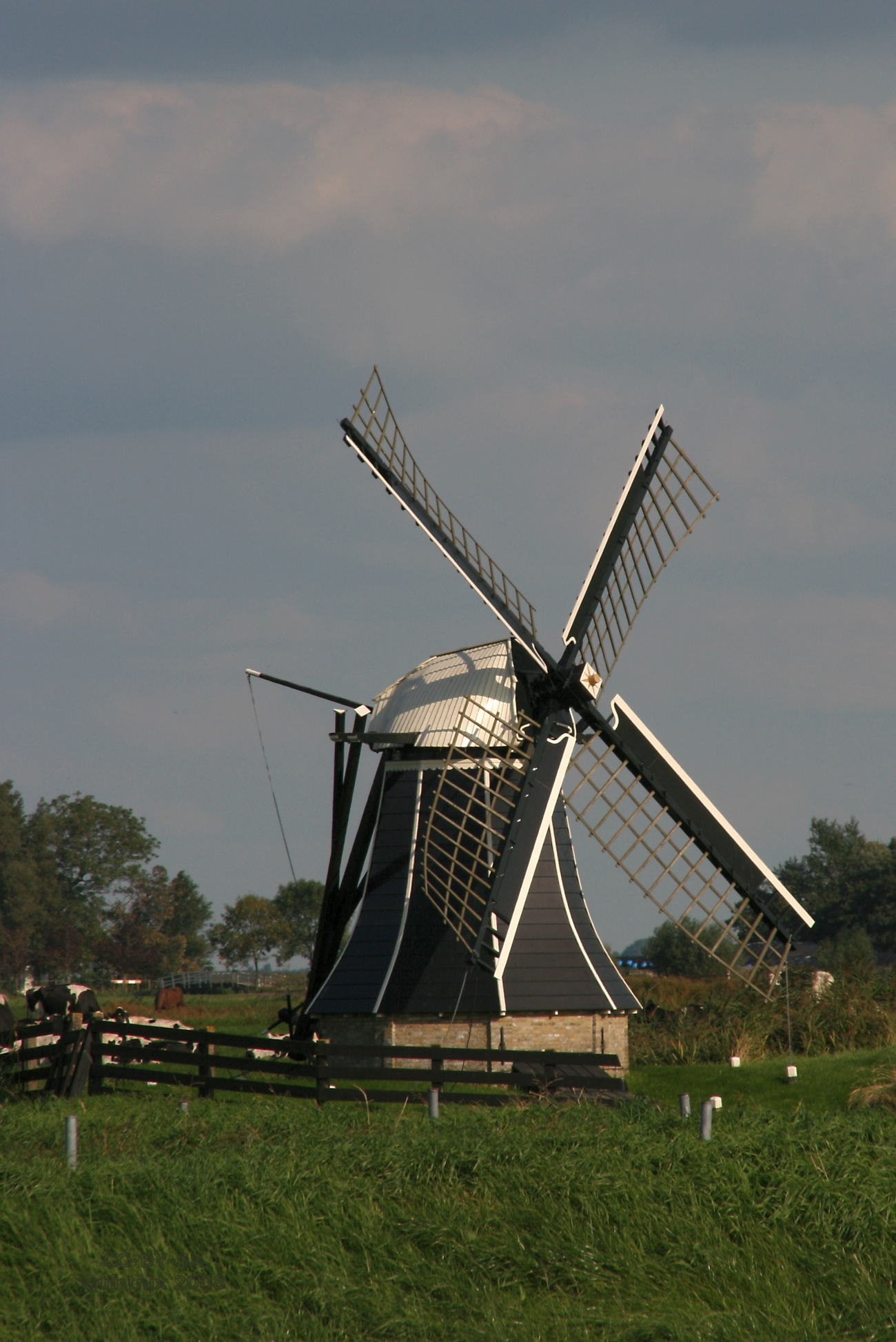 Edens (Iens): Edensemolen